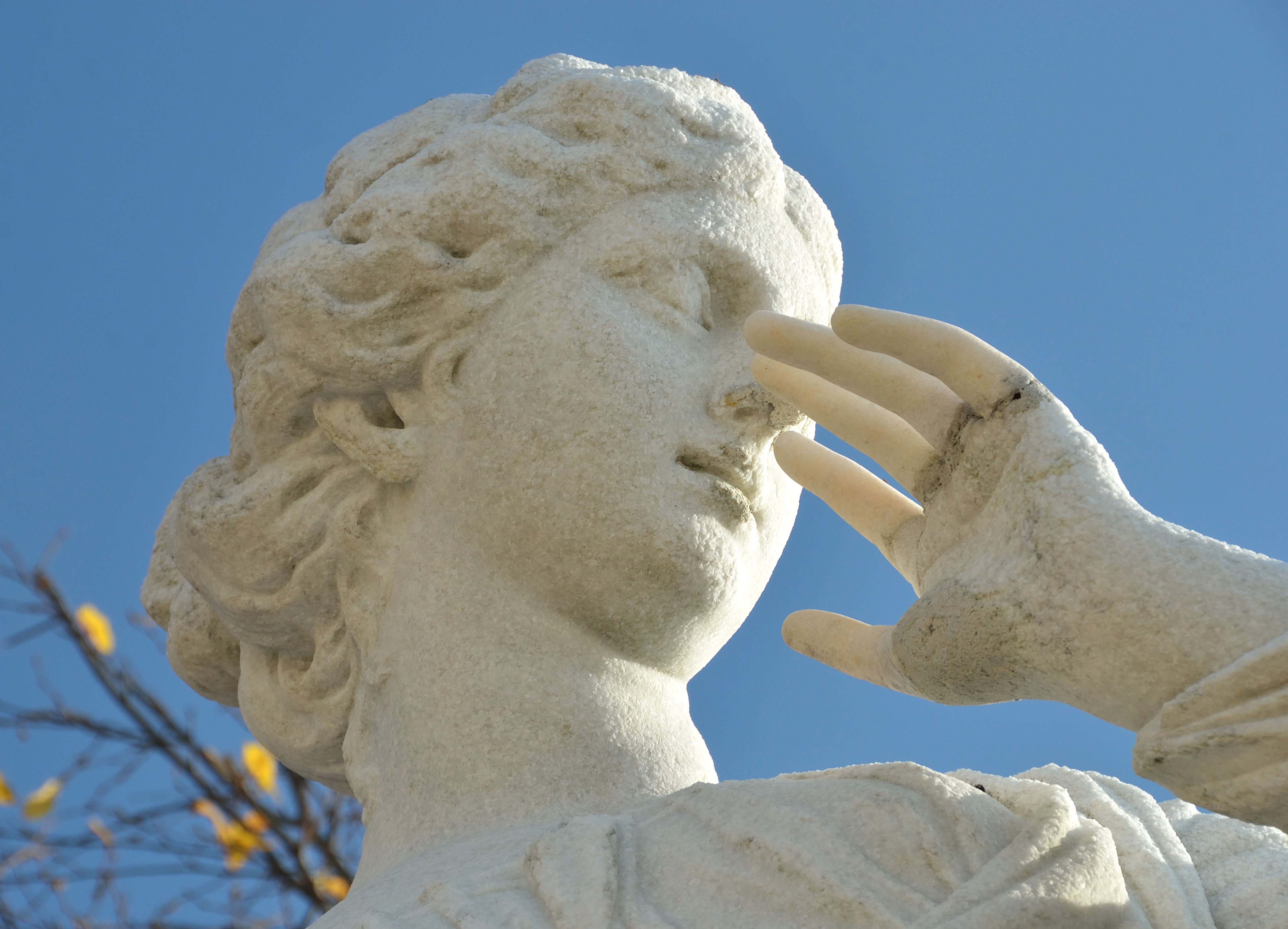 Wien, Schlosspark Schönbrunn, Figuren aus Sterzinger Marmor am Großen Parterre, 0; Nr. 6: Angerona. Bildhauer: Wilhelm Beyer. Restaurationsspuren.